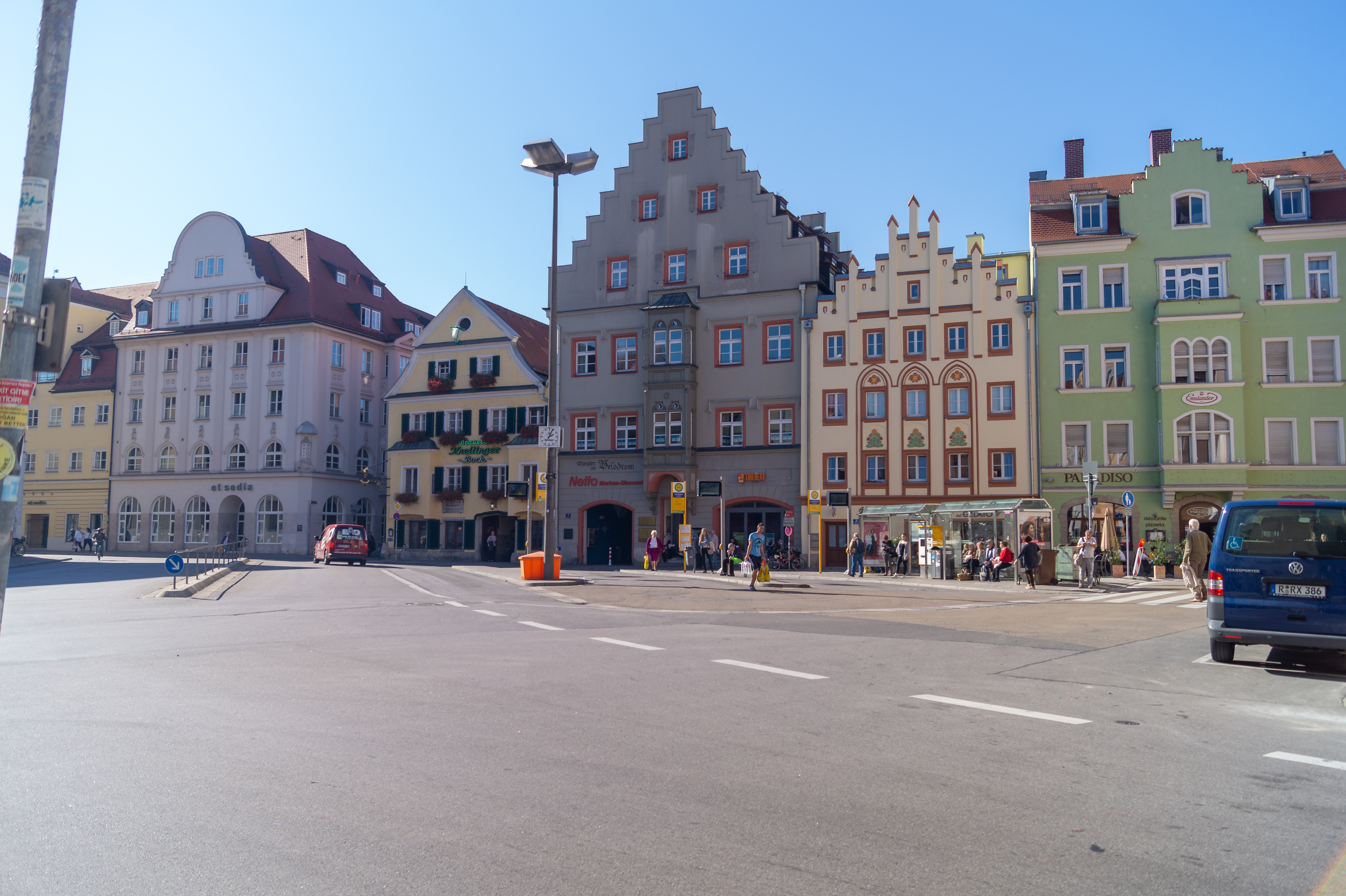 Westfassade des Arnulfsplatzes in Regensburg